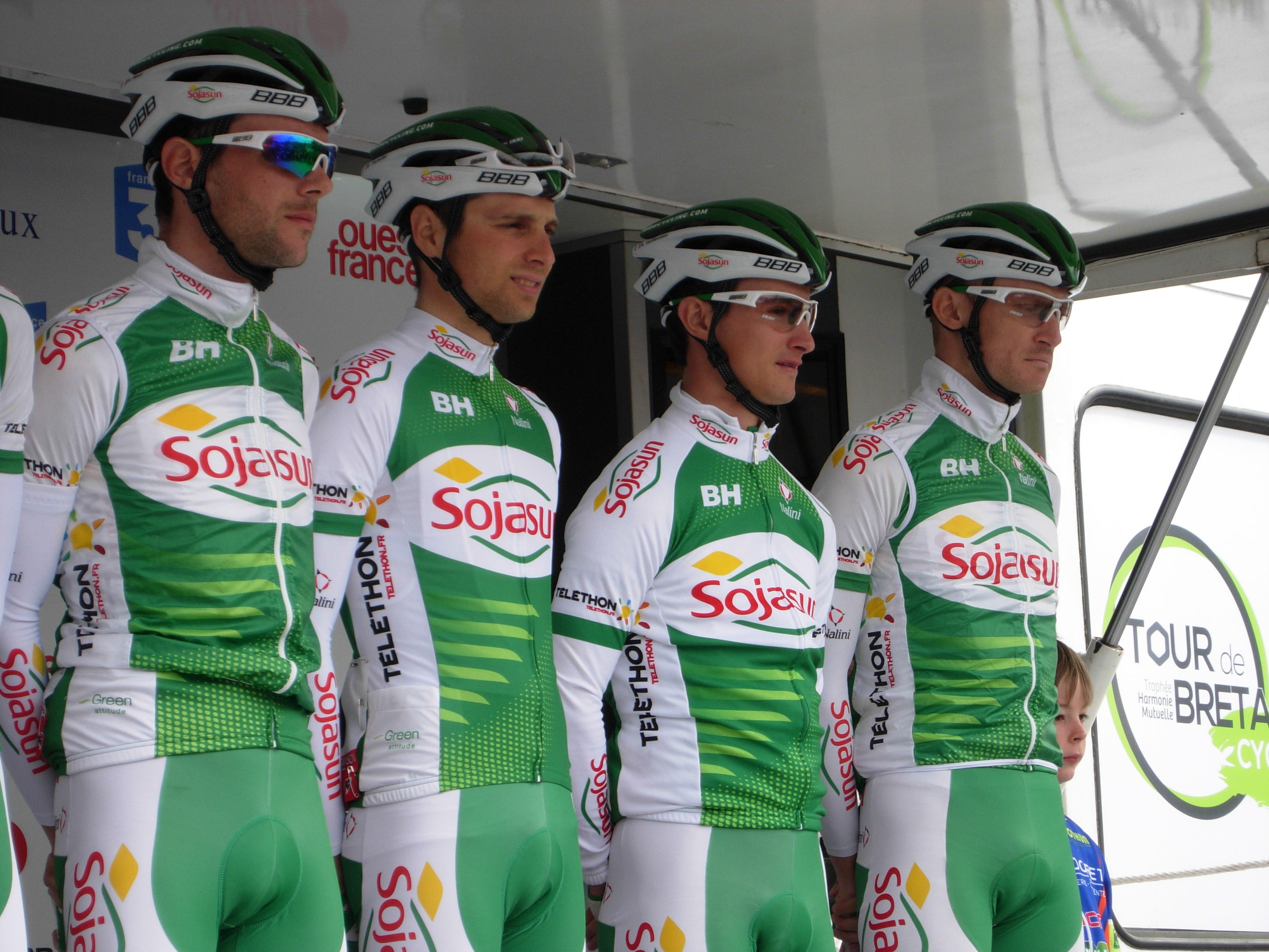 Tour de Bretagne 2013 - Présentation des équipes au départ de la deuxième étape à Ploemel - Équipe Sojasun Depicted people: Paul Poux, Étienne Tortelier, Alexis Vuillermoz and Fabrice Jeandesboz